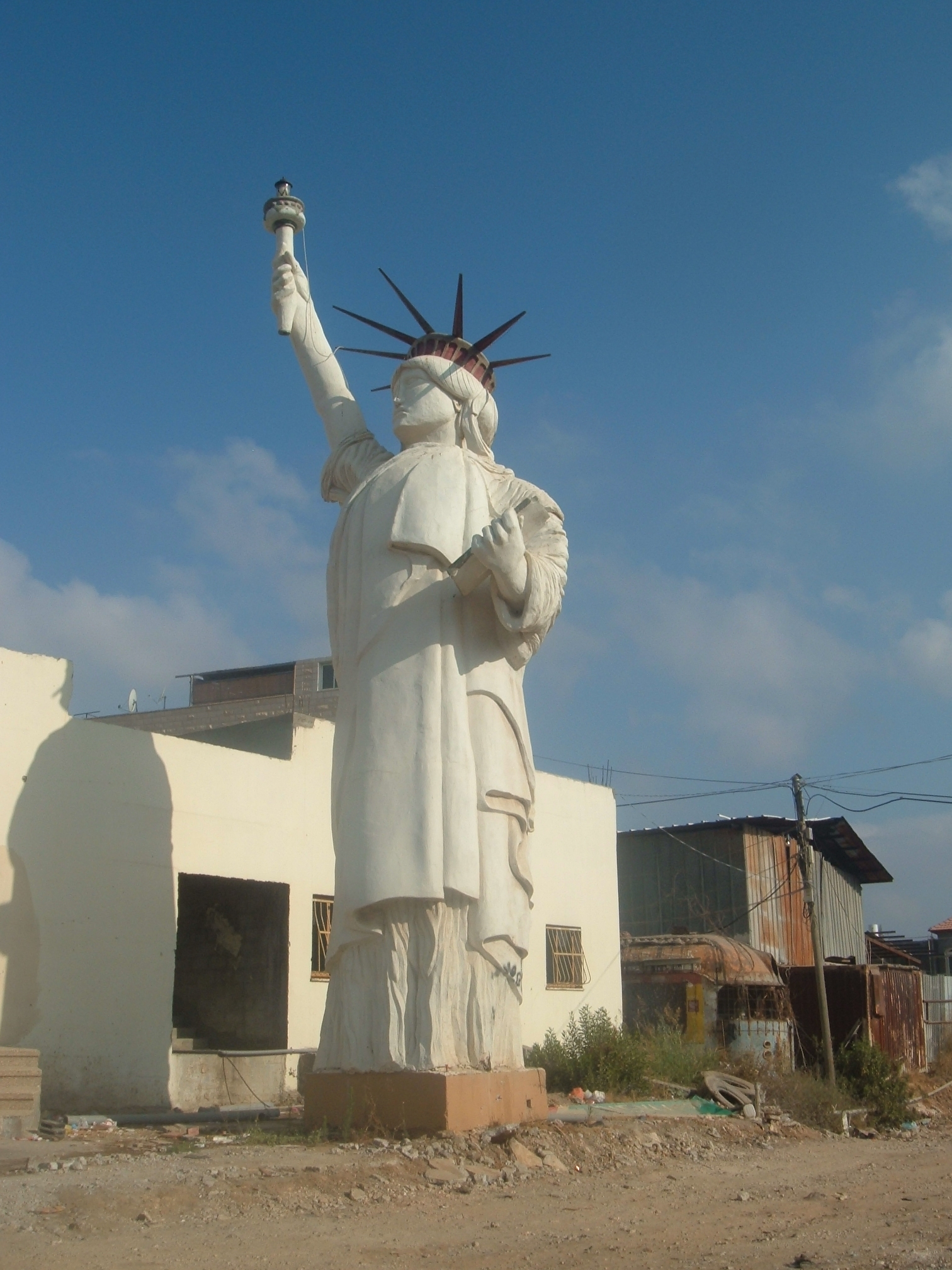 a copy of the statue of liberty in the village of Arrabe, Israel העתק של פסל החירות בכפר עראבה בגליל